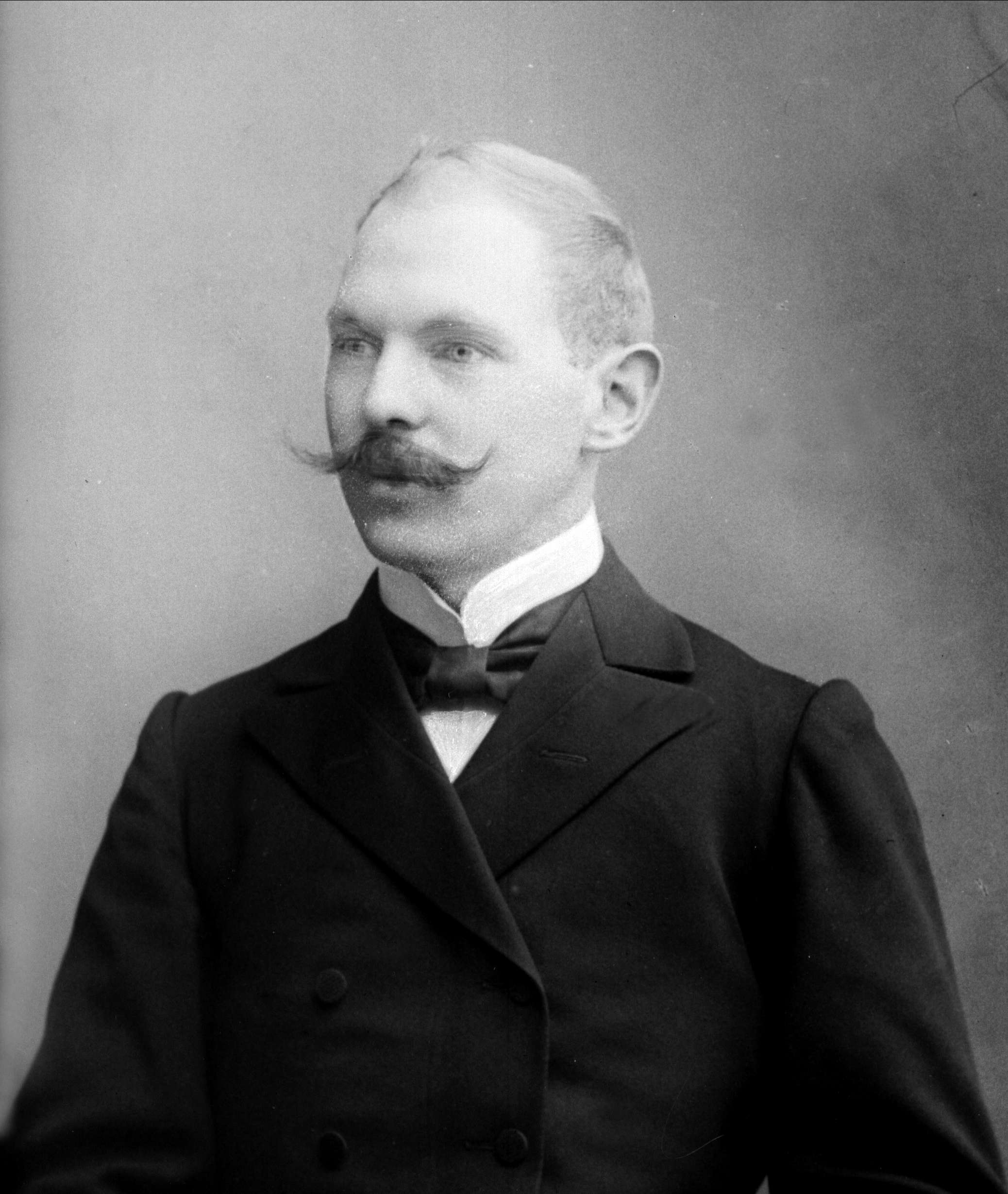 Hans Bie Lorentzen (1877–1926), ingeniør, industrileder